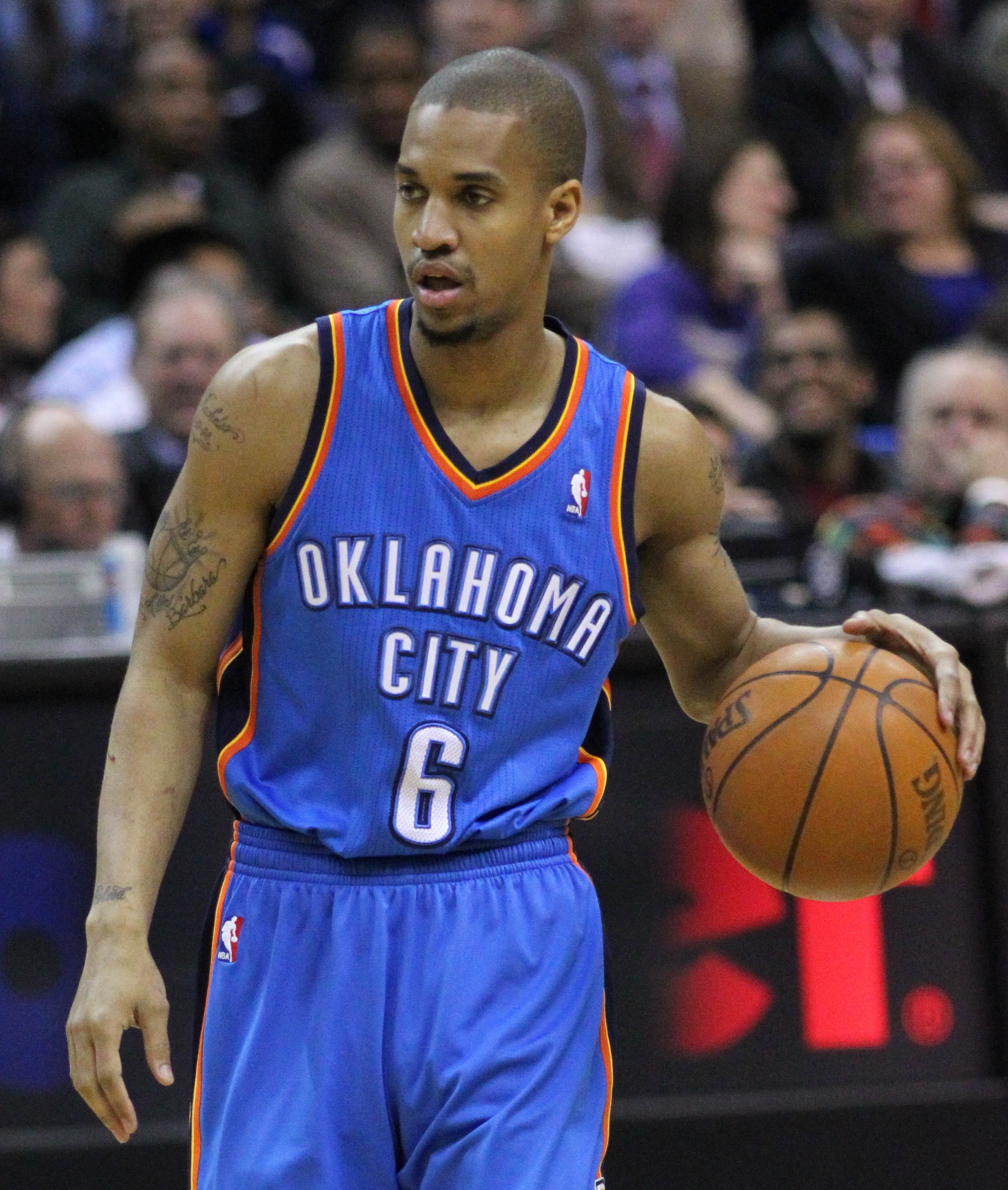 Wizards v/s Thunder 03/14/11